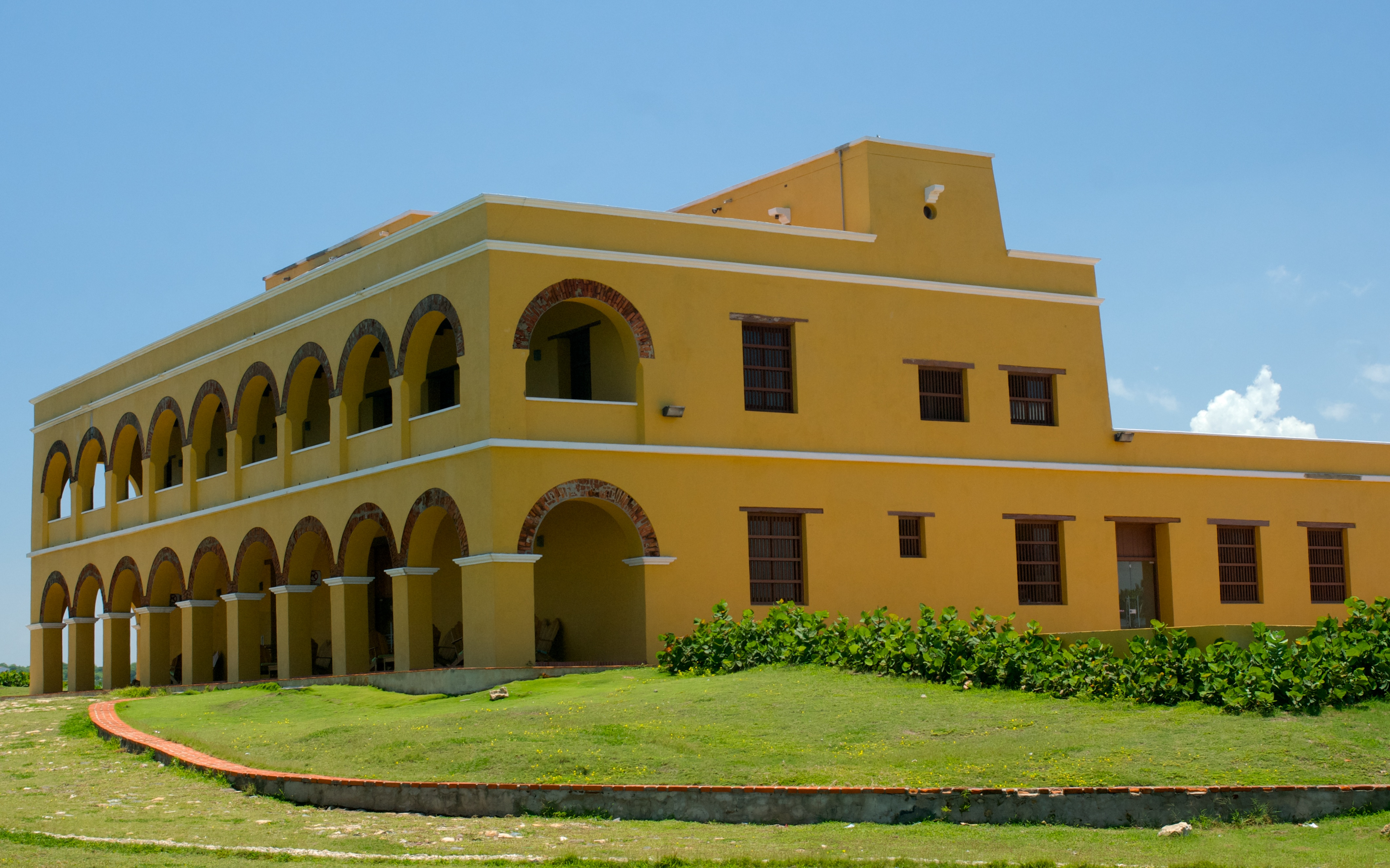 Fuerte español que una vez fue presidio y más tarde sirvió como refugio.